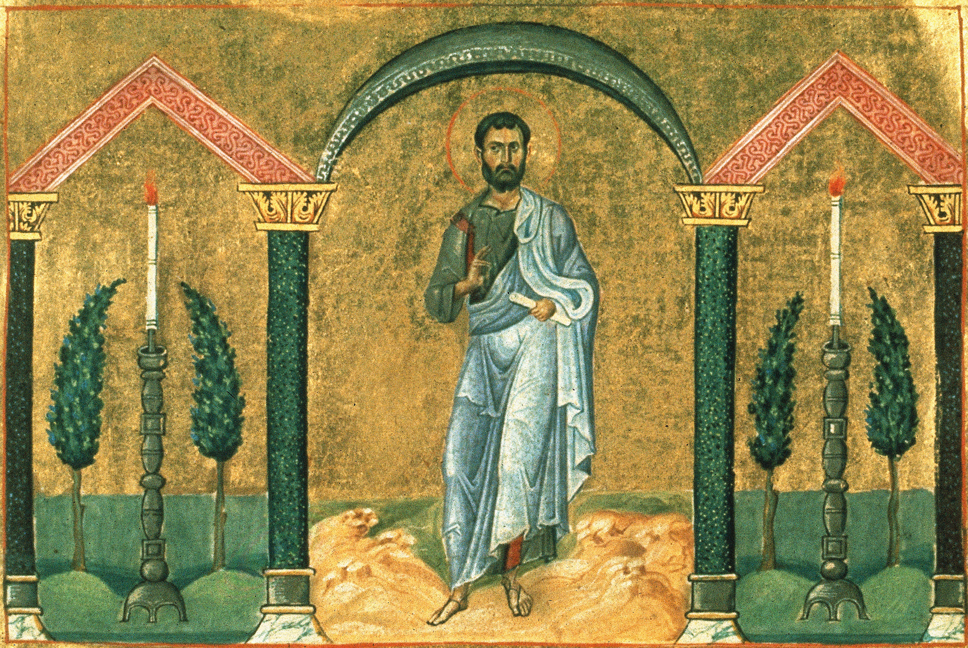 Священномученик Тимон, апостол от 70-ти . Константинополь. 985 г. Миниатюра Минология Василия II. Ватиканская библиотека. Рим.